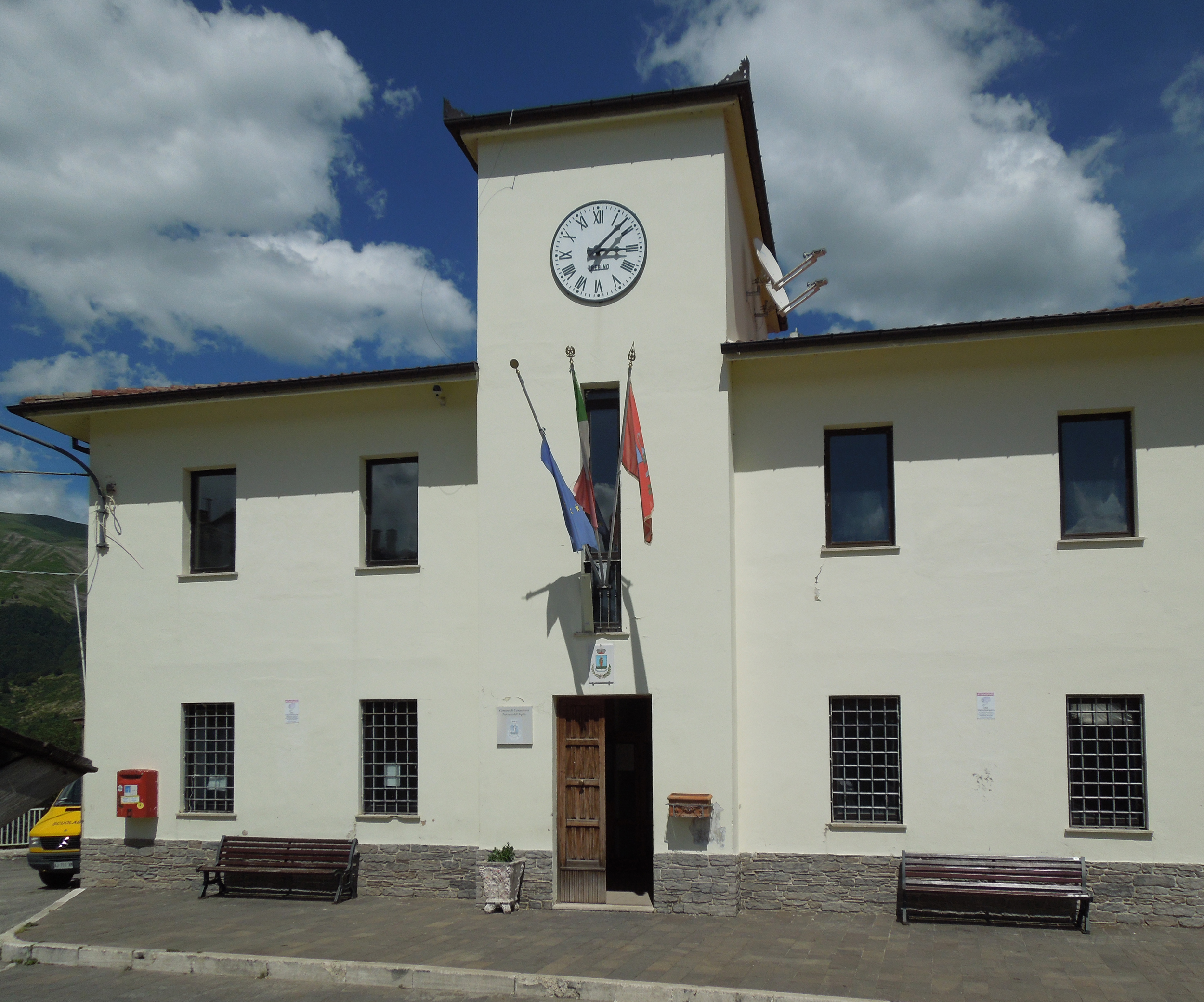 Municipio di Campotosto in provincia dell'Aquila - Luglio 2016